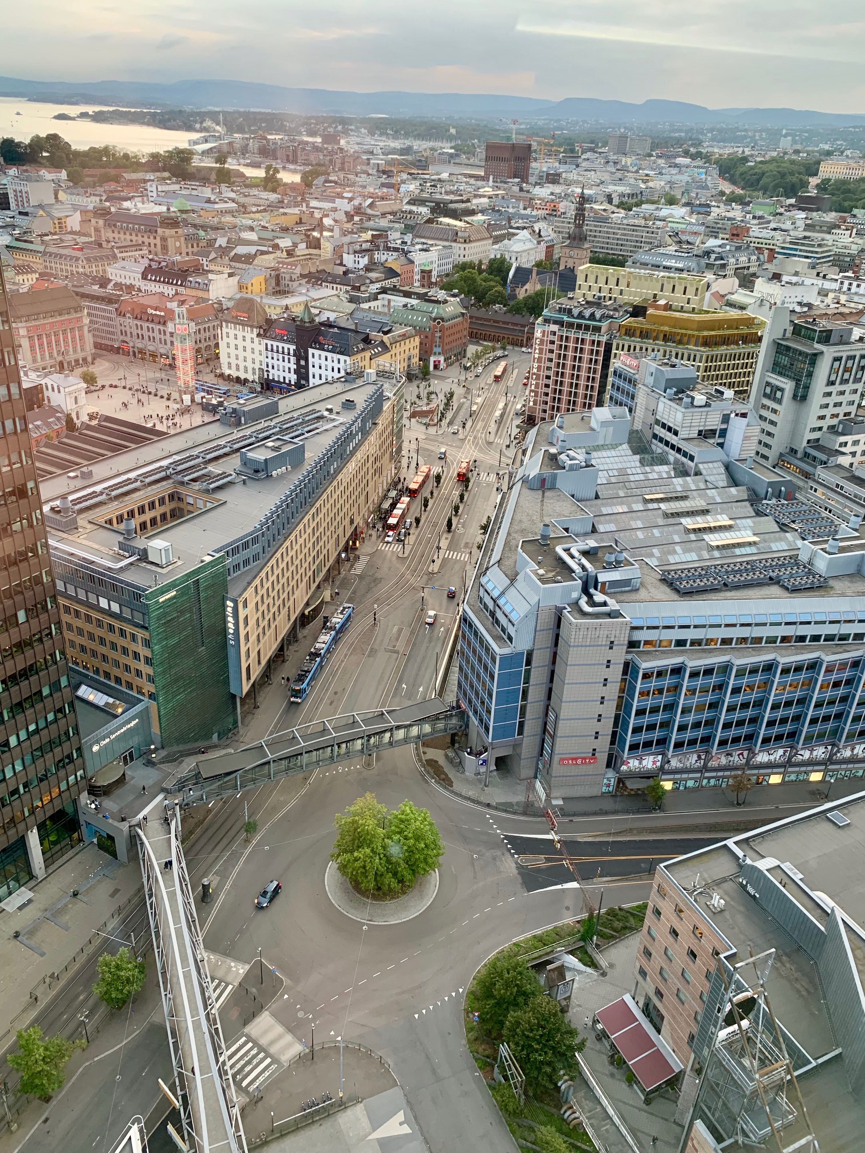 Biskop Gunnerus’ gate. Sett fra toppen av Oslo Plaza.